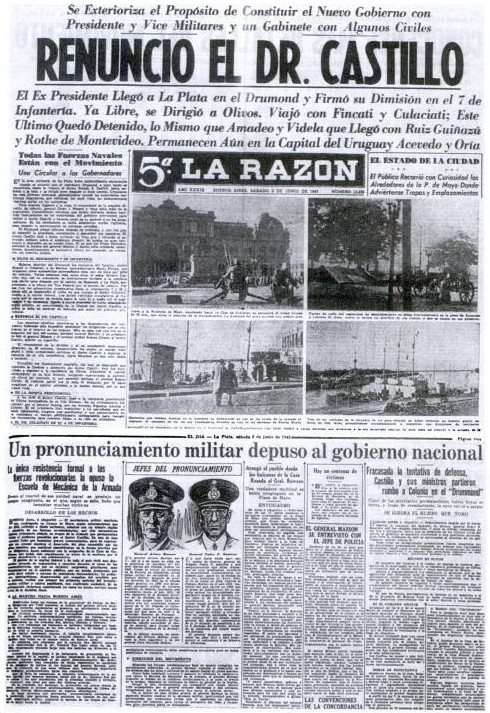 Portadas de los diarios "La Razón" y "El Día" anunciando la caída del gobierno de Castillo